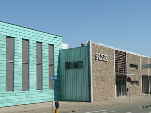 SCEZ locatie "Het Schuitvlot"